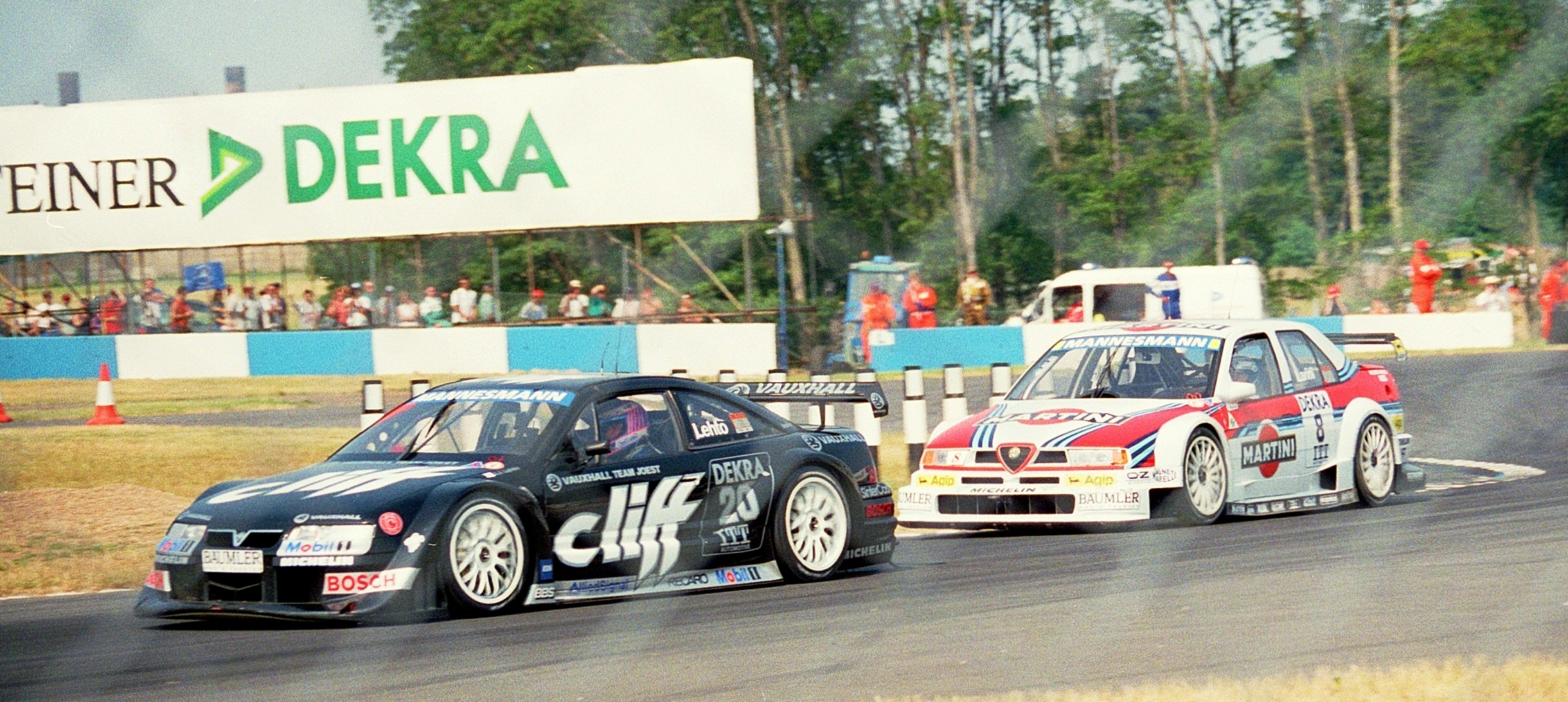 JJ Lehto - Opel Calibra V6 4x4 leads Nicola Larini - Alfa Romeo 155 V6 Ti at Donington 1995